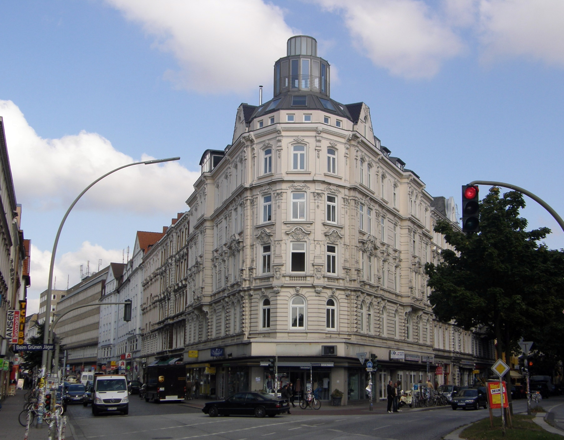 Blick vom Pferdemarkt in das Schulterblatt, rechts Schanzenstraße Hamburg Sternschanze